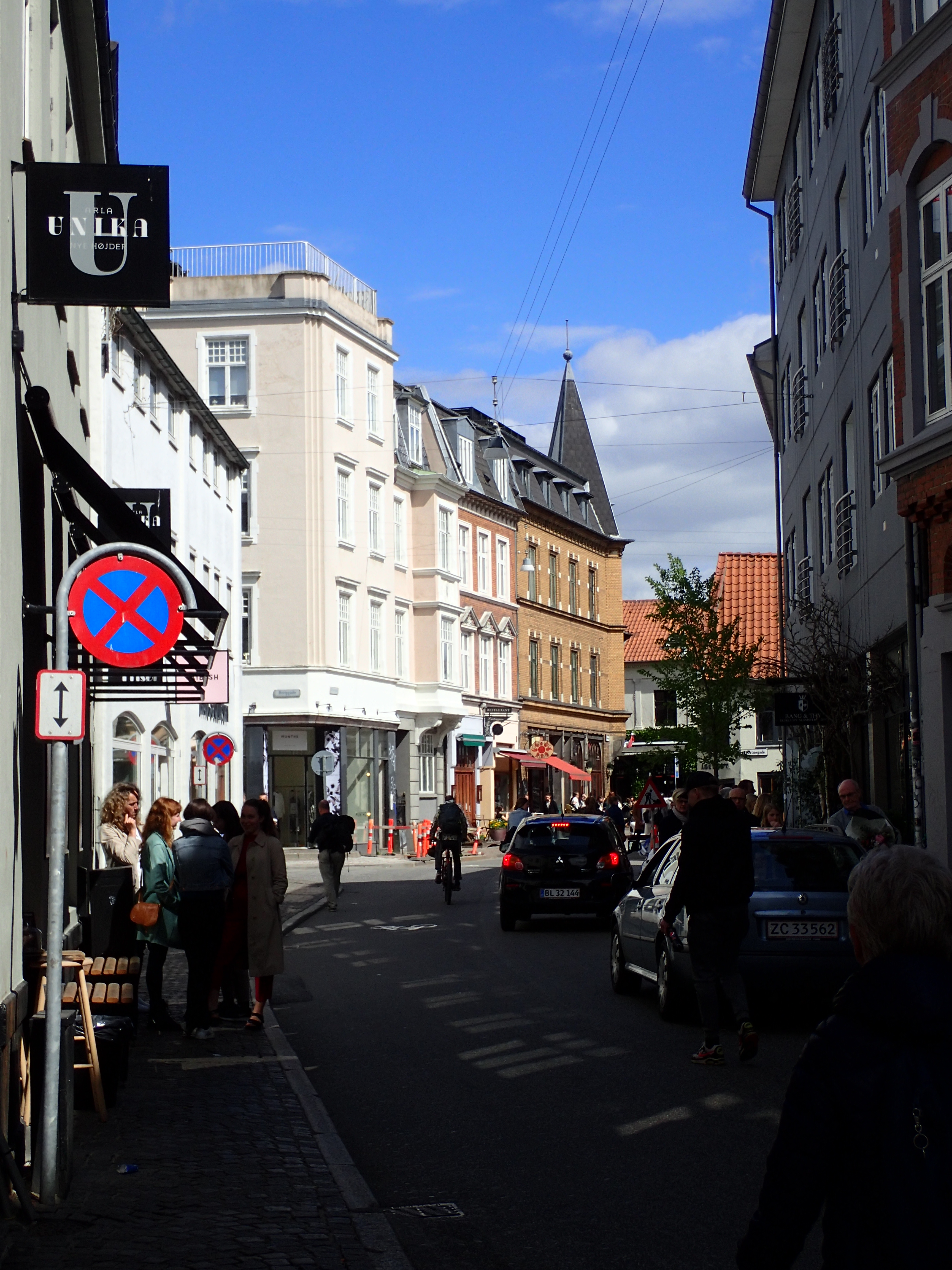 Klostergade, Aarhus.